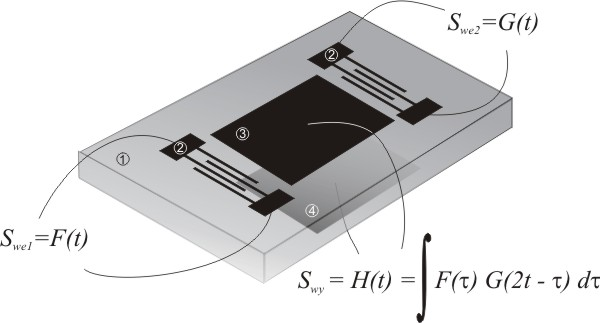 Konwolutor